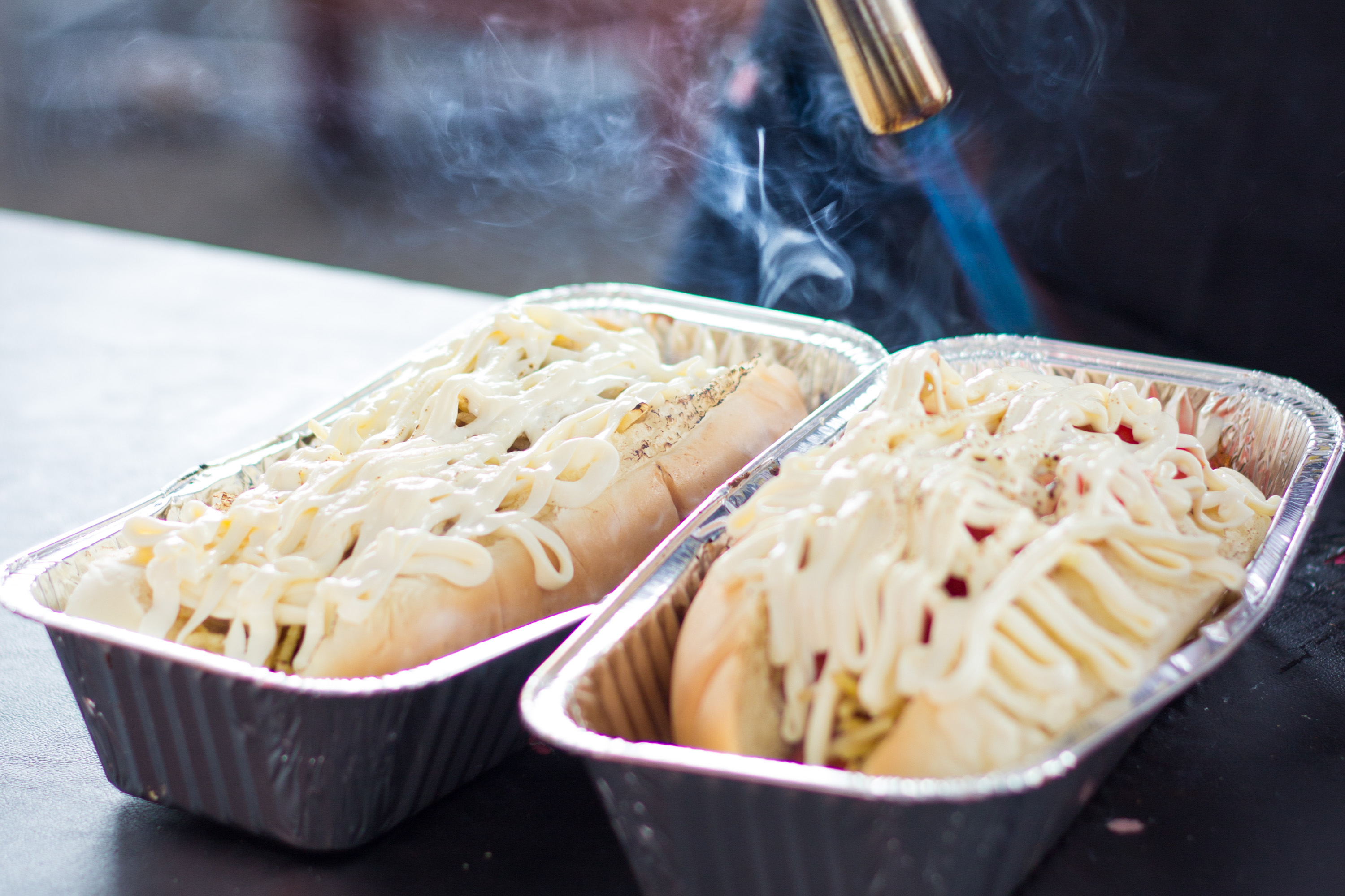 [2014-11-22] Friends Dog - Paraguaçu Paulista - Hot dog maçaricado_Romerito Pontes